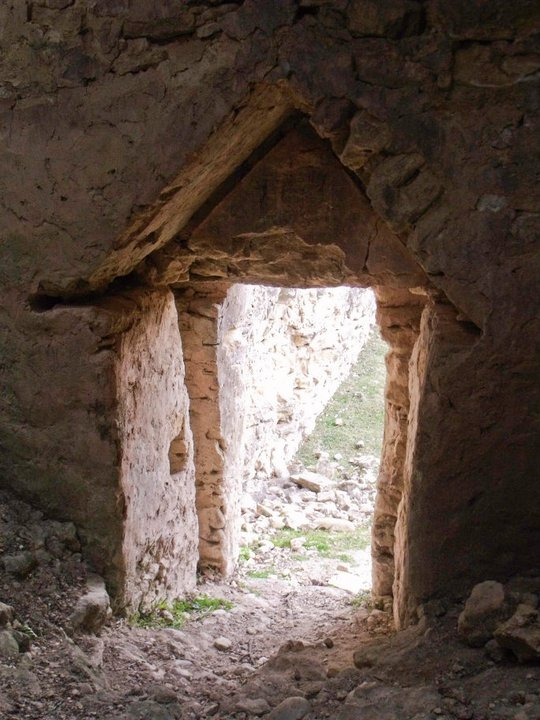 ჭაქვინჯის ციხე